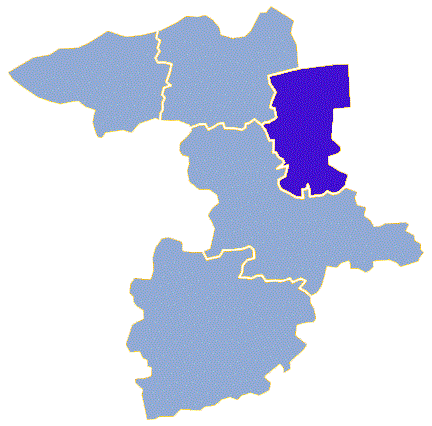 Powiat sulęciński - Gmina Lubniewice